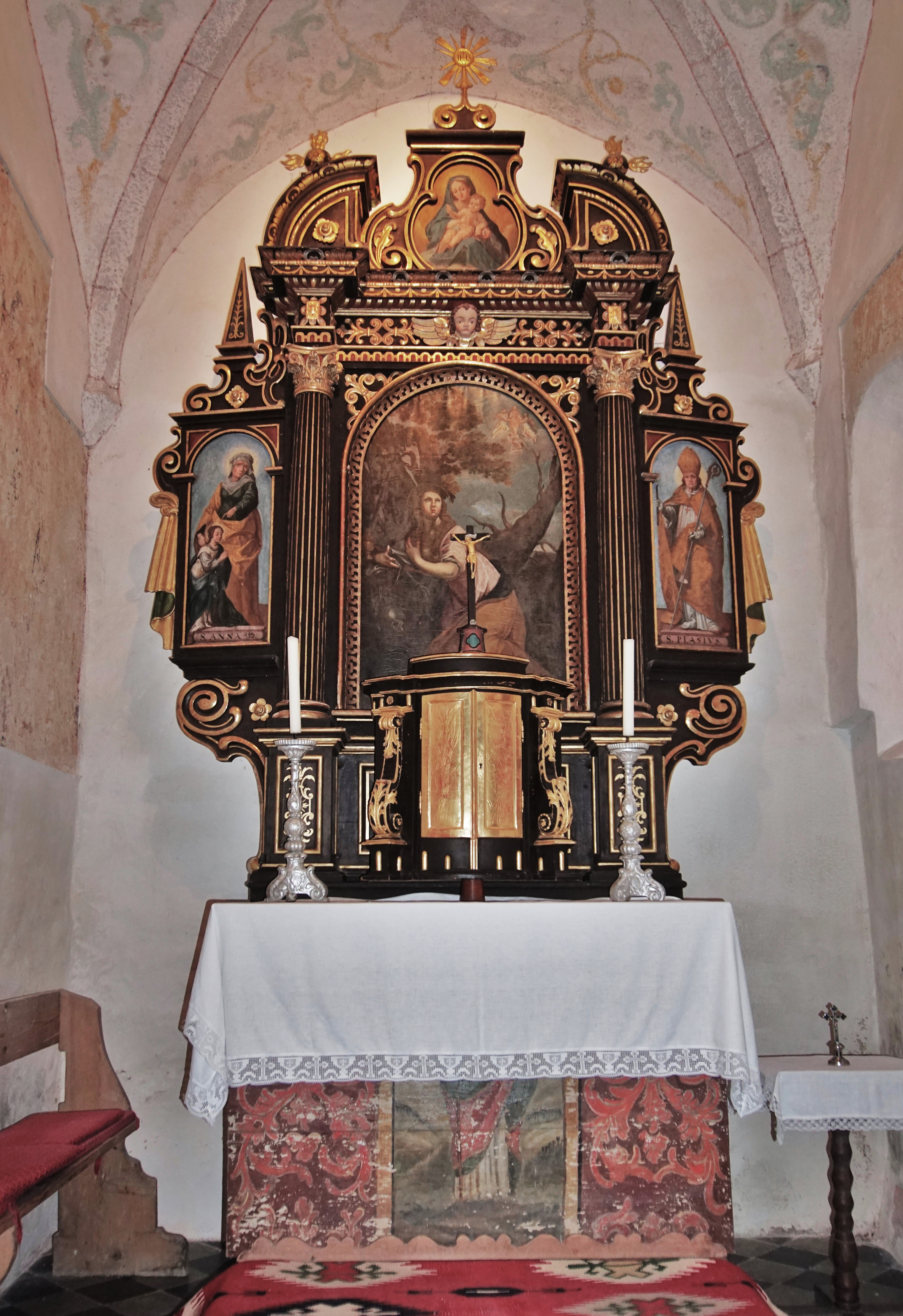 Kath. Filialkirche St. Magdalena (Weitensfeld), Hochaltar